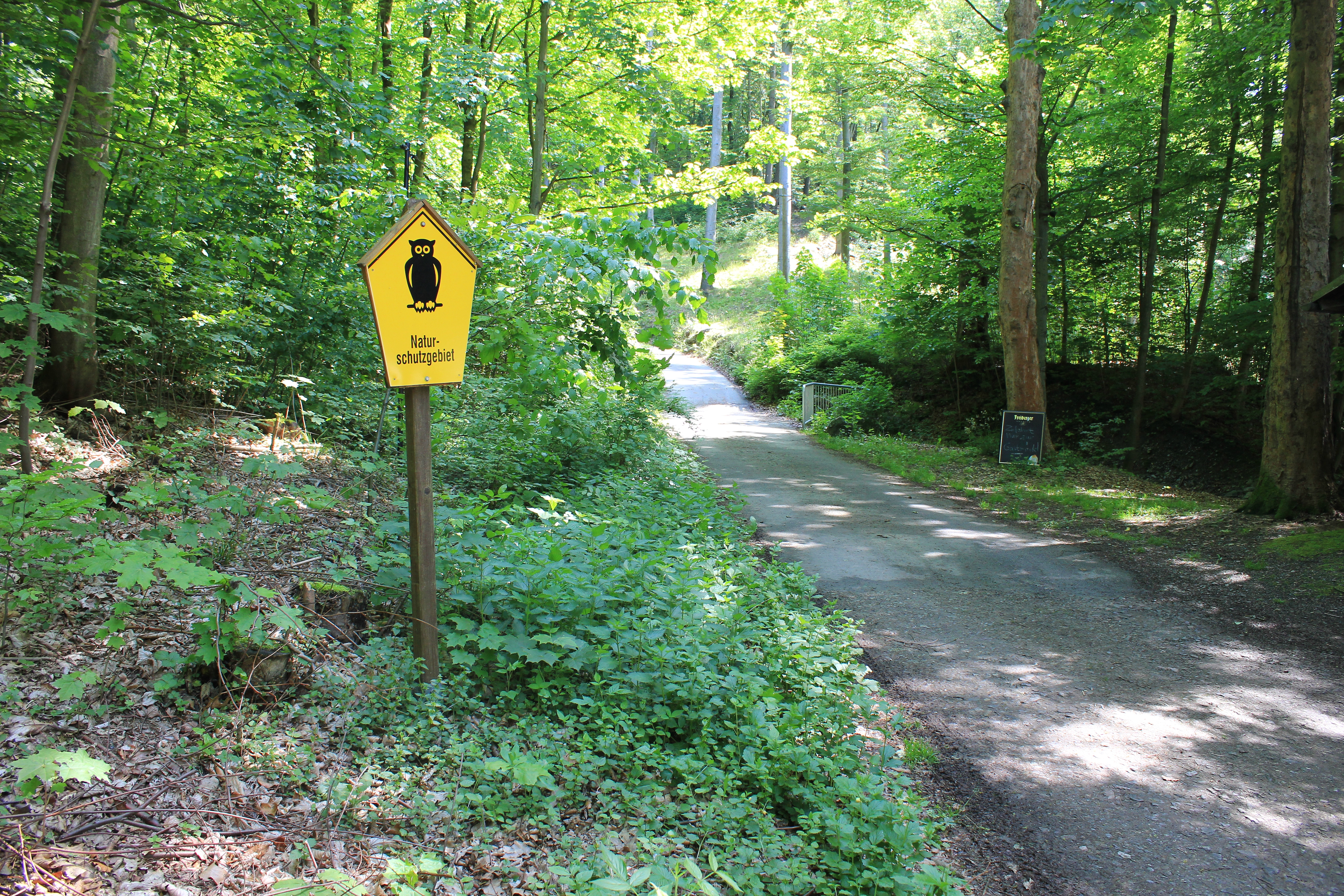 Landkreis Zwickau- Hartensteiner Wald. Naturschutzgebiet C04, Westerzgebirge. Sachsen.